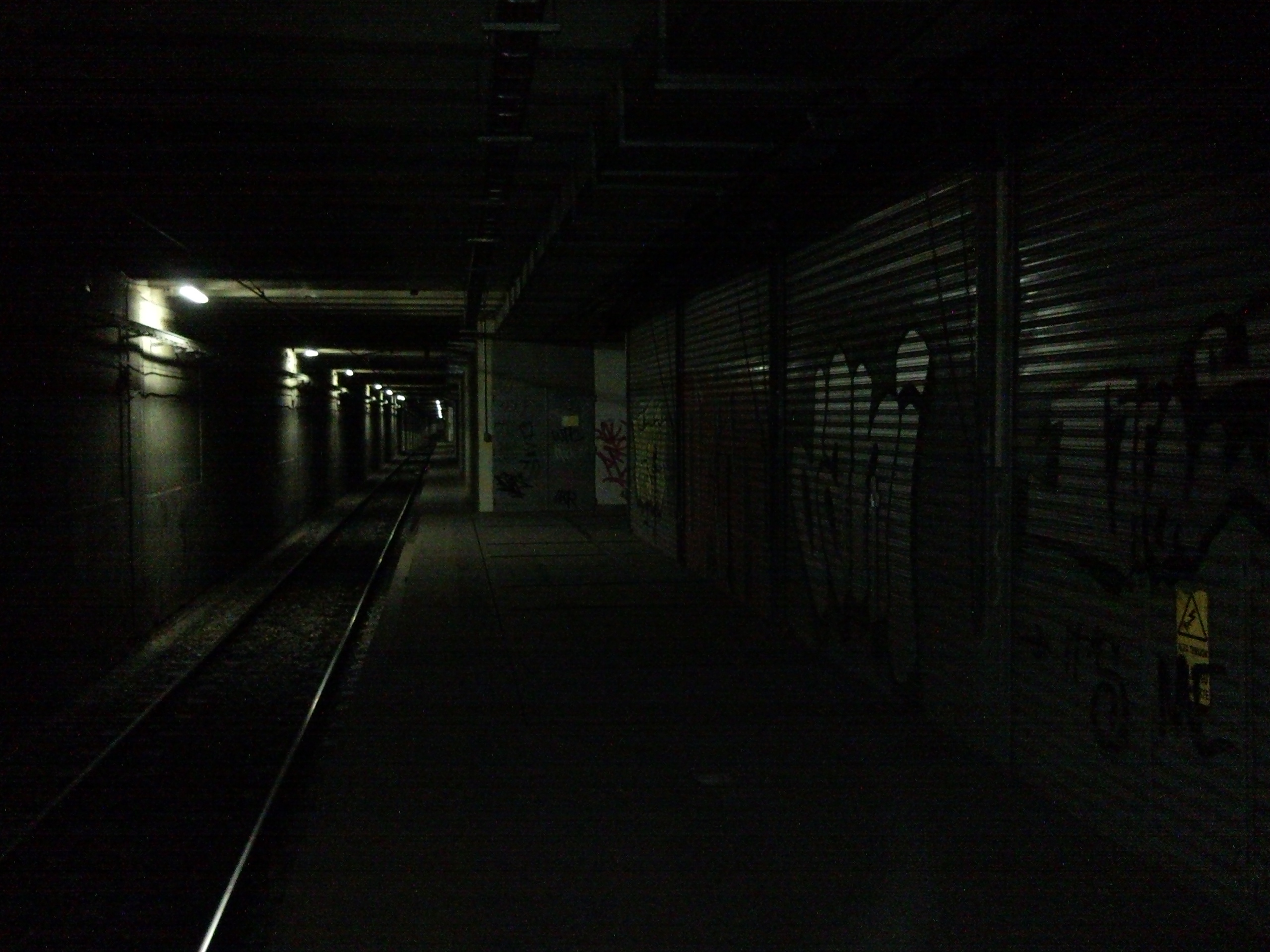 Estación abandoanda Alberti Norte